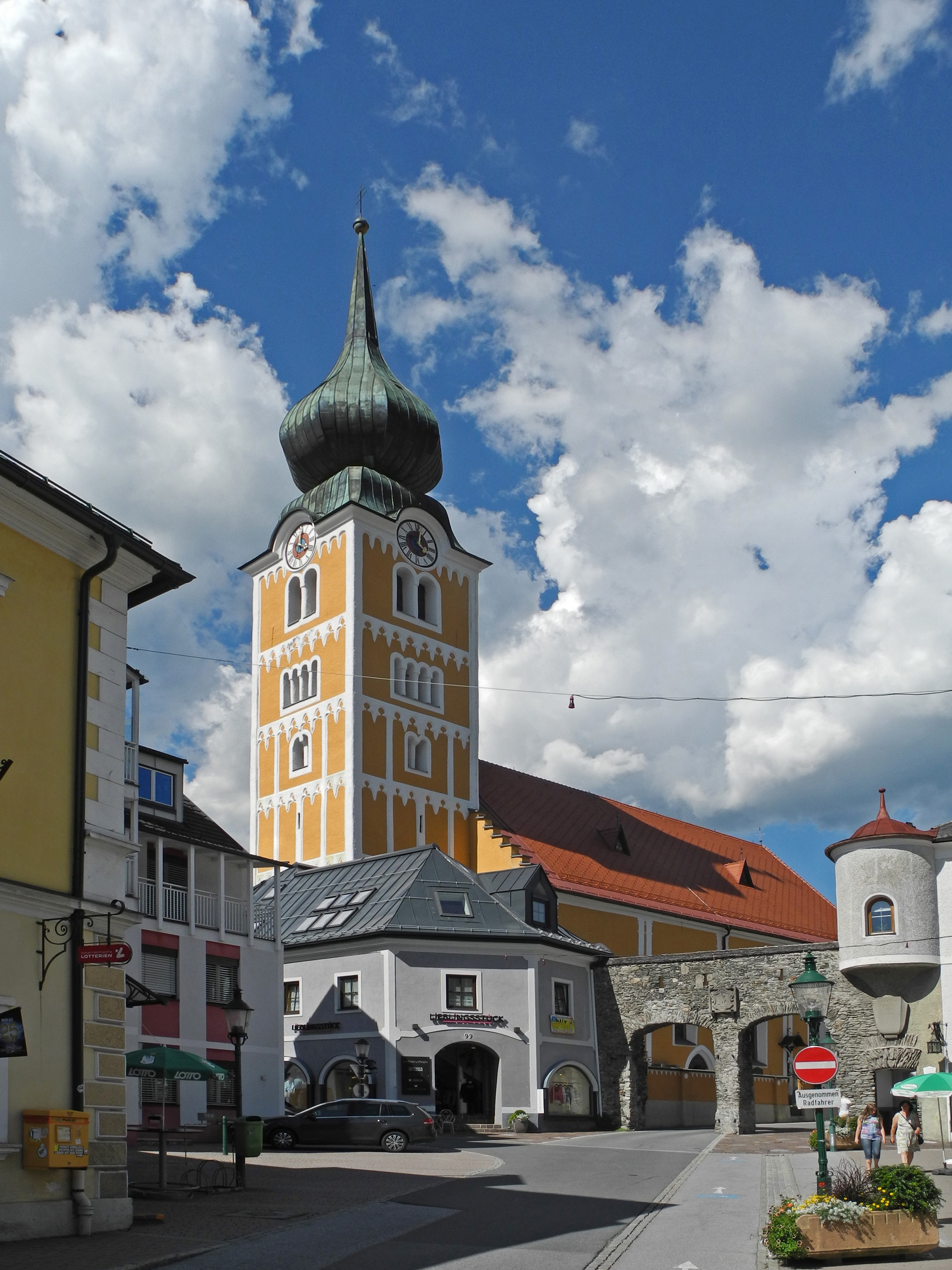 Stadtpfarrkirche hl. Achaz in Schladming